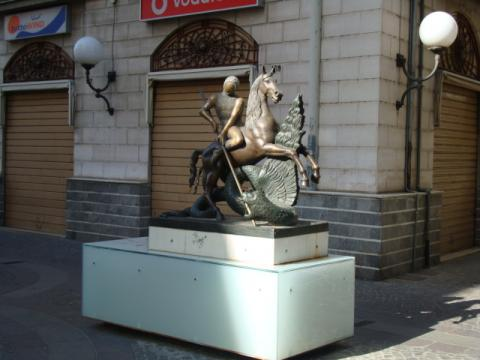 Opera nel Museo all'aperto Bilotti sull'isola pedonale di Corso Mazzini a Cosenza